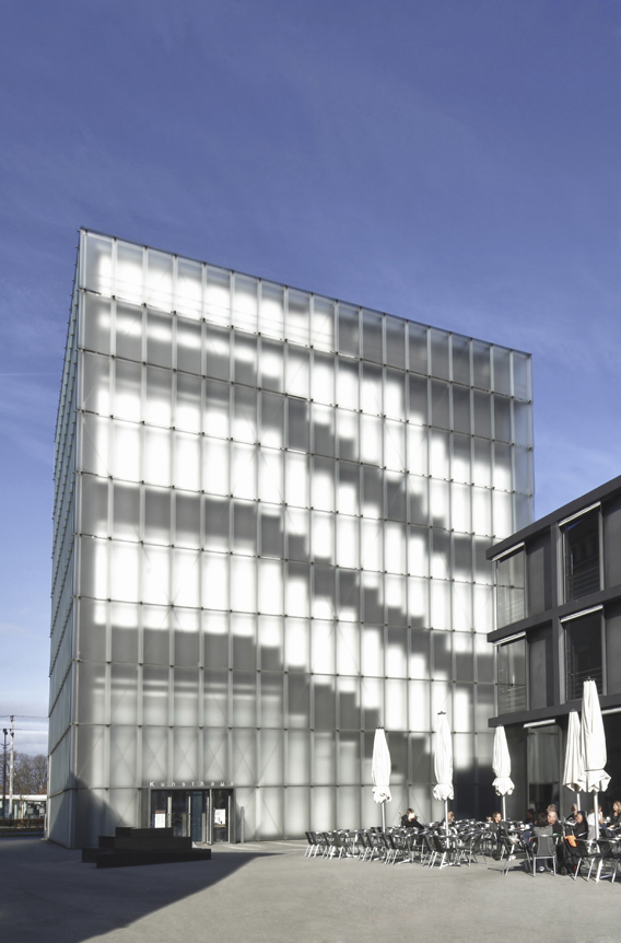 Kunsthaus Bregenz, Außenansicht